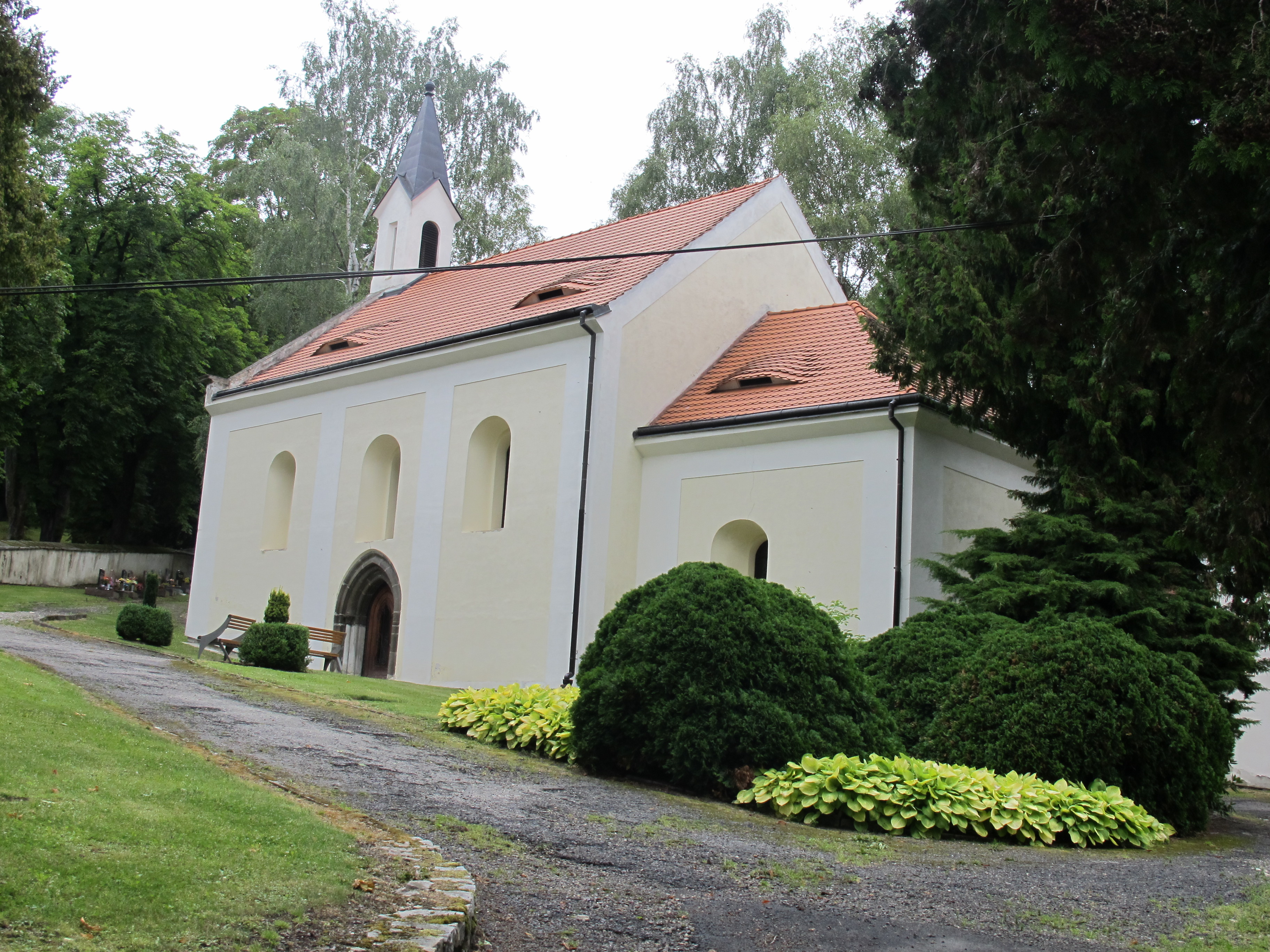 Kostel svatého Bartoloměje, Vimperk.